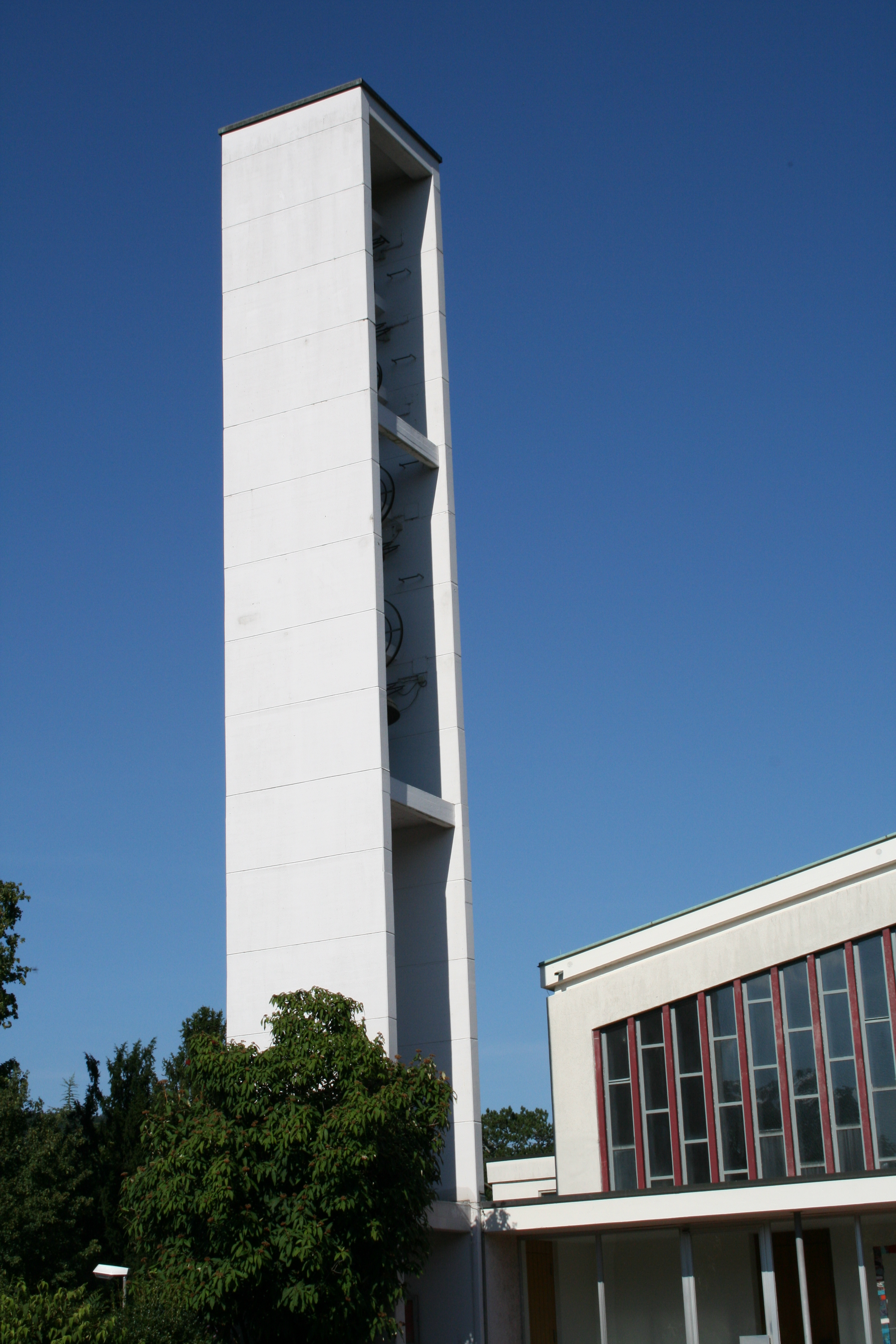 Kirchturm der ref. Kirche Turgi AG, Schweiz